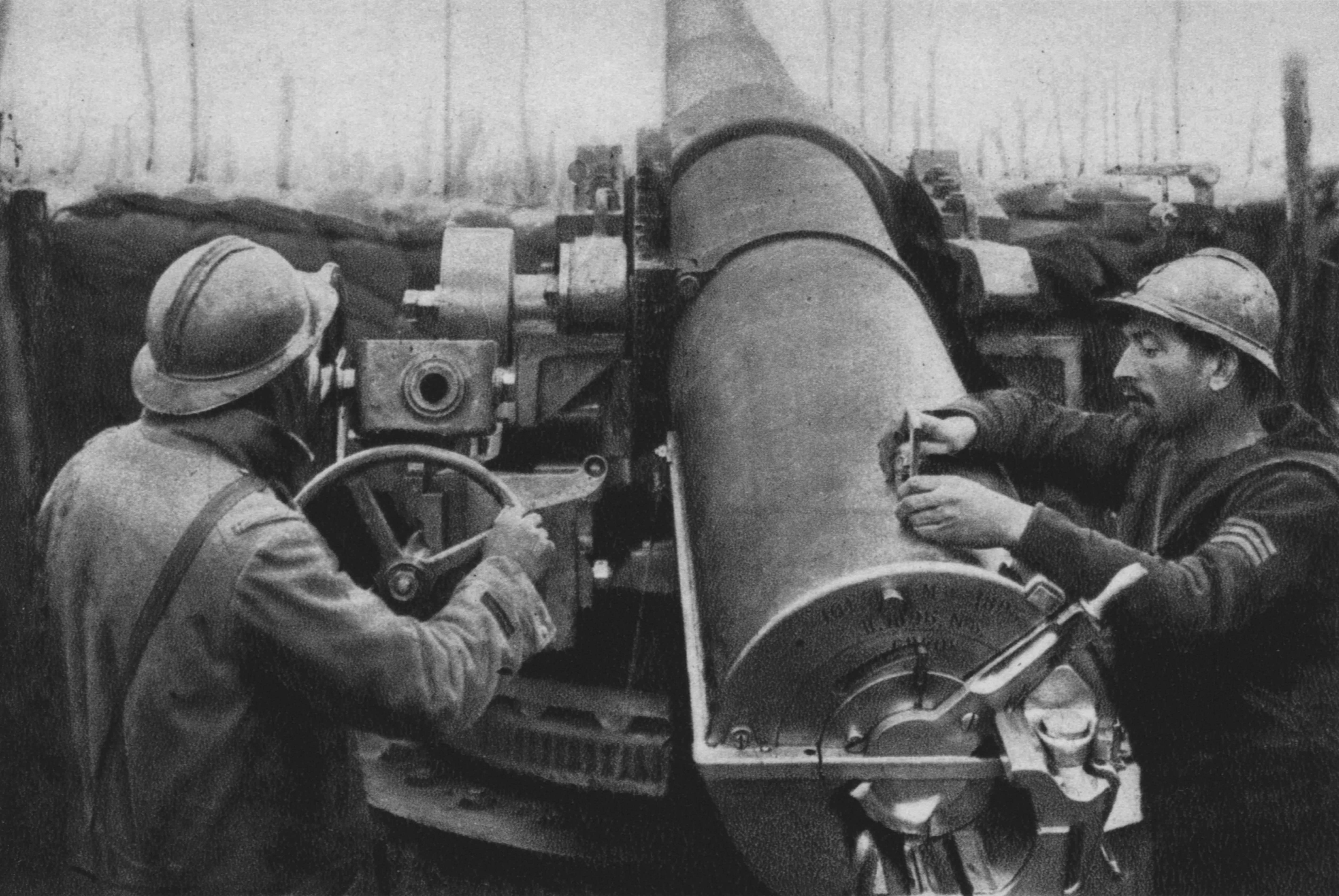 Ein 16,47-Marinegeschüss wird zum Schuss eingestellt